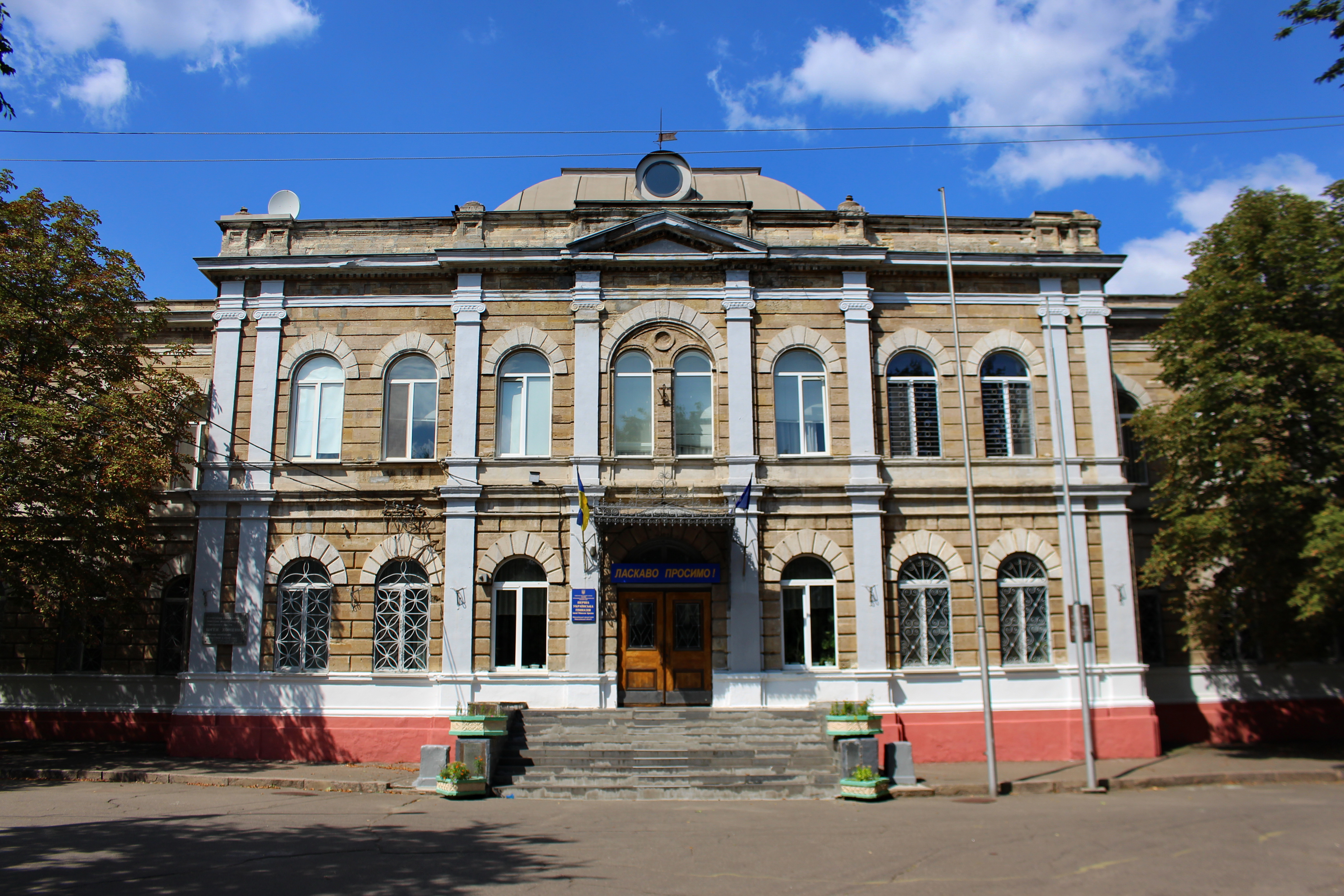 Маріїнська гімназія, де пізніше була школа, в якій навчався у 1941–1942 рр. В. Хоменко, юний розвідник, учасник підпільної організації «Миколаївський центр», Миколаїв, вул. Нікольська, 34 (Аркасівський сквер)